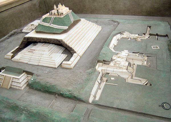 Eigen werk.